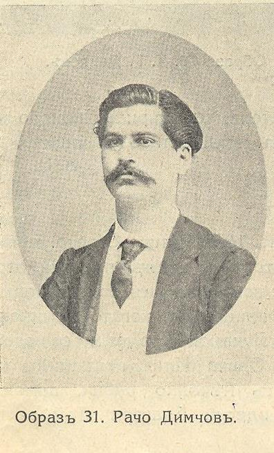 Ловеч и Ловчанско, книга 3, 1931, стр. 130 - Рачо Димчов